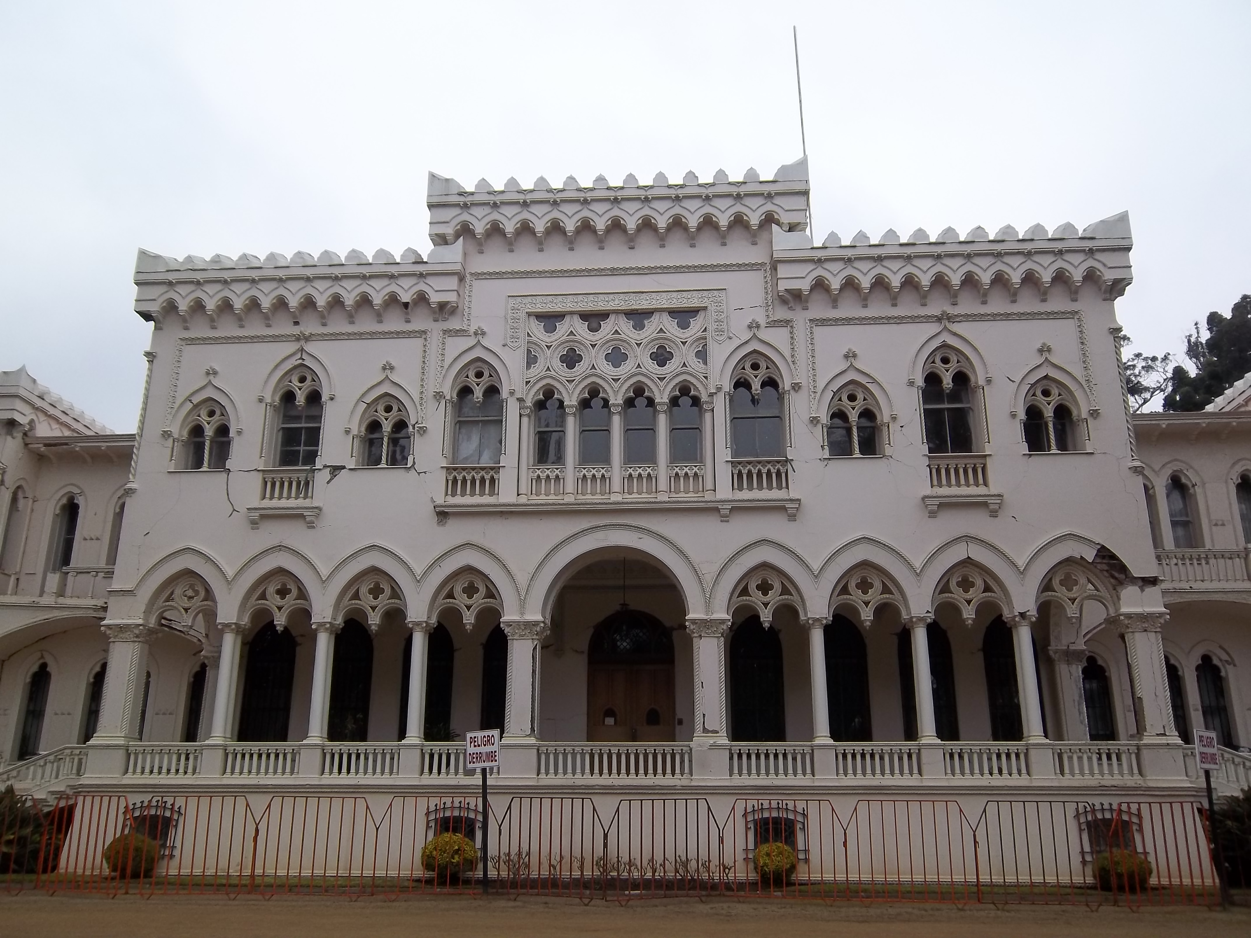 Palacio Vergara después del terremoto de 2010. Ubicado en Viña del Mar, Región de Valparaíso, Chile.